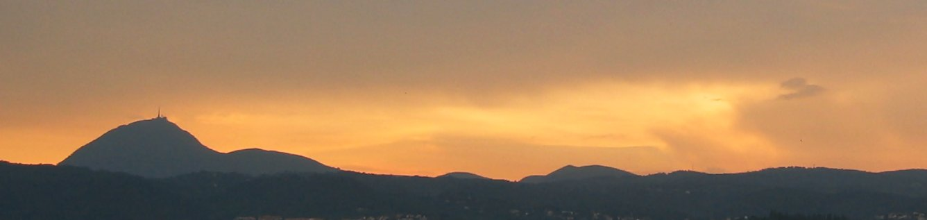 Puy-de-Dôme, Auvergne